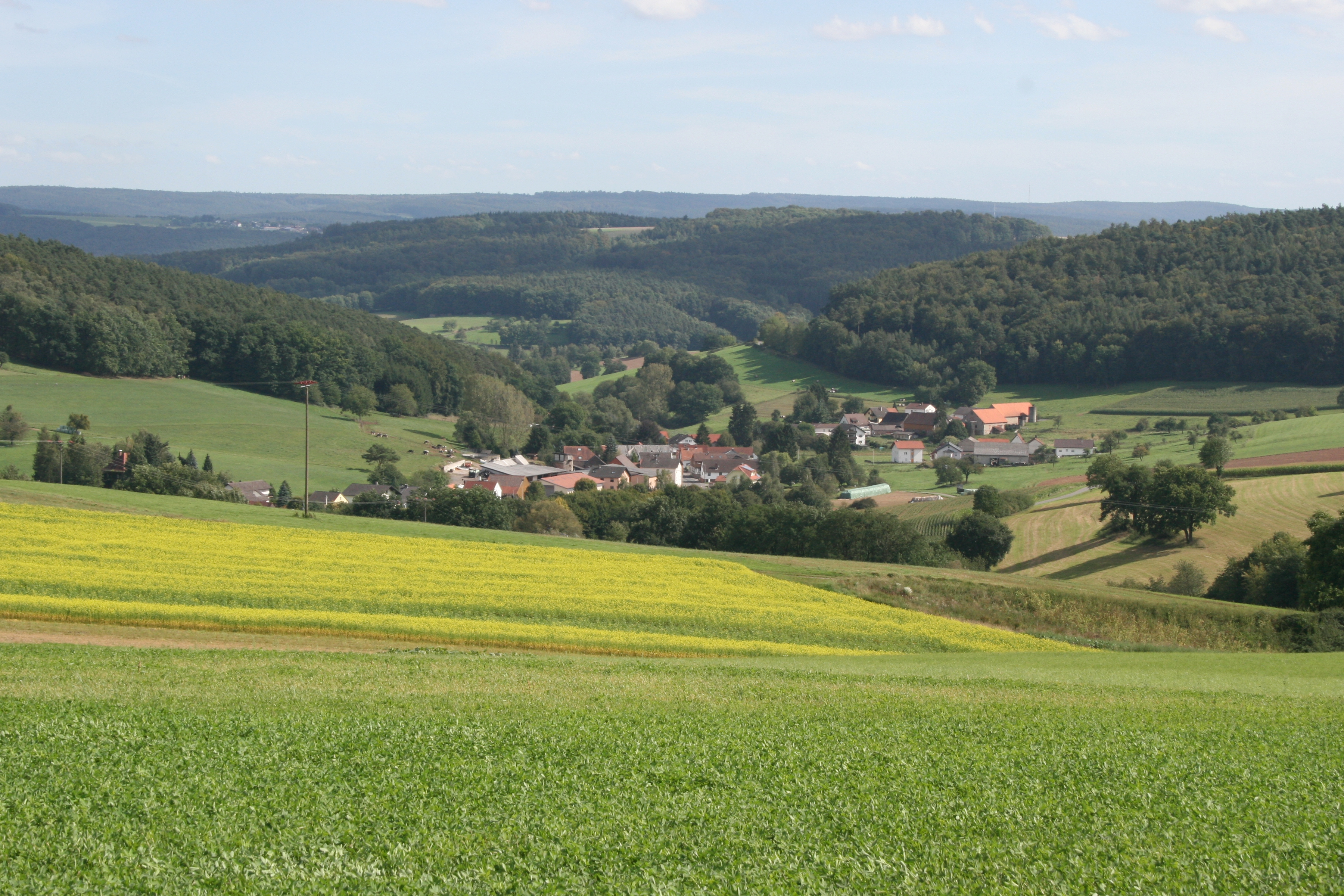 Mittel-Kinzig, OT von Bad König im Odenwald, Ansicht von Nordwesten.